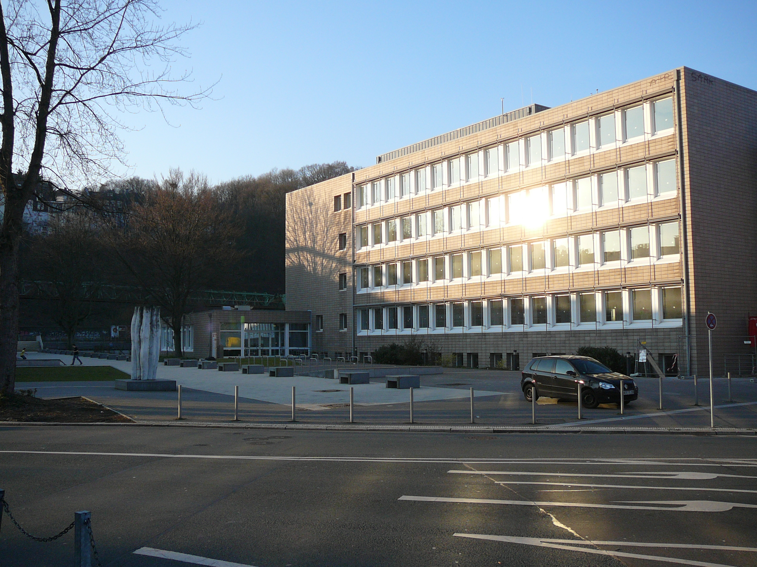 Friedrich-Engels-Allee, Wuppertal